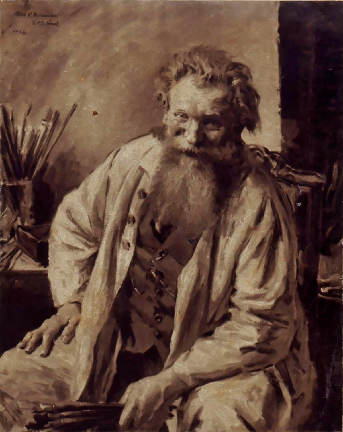 Fr.A.Jelínek - portrét ak.malíře Oty Bubeníčka